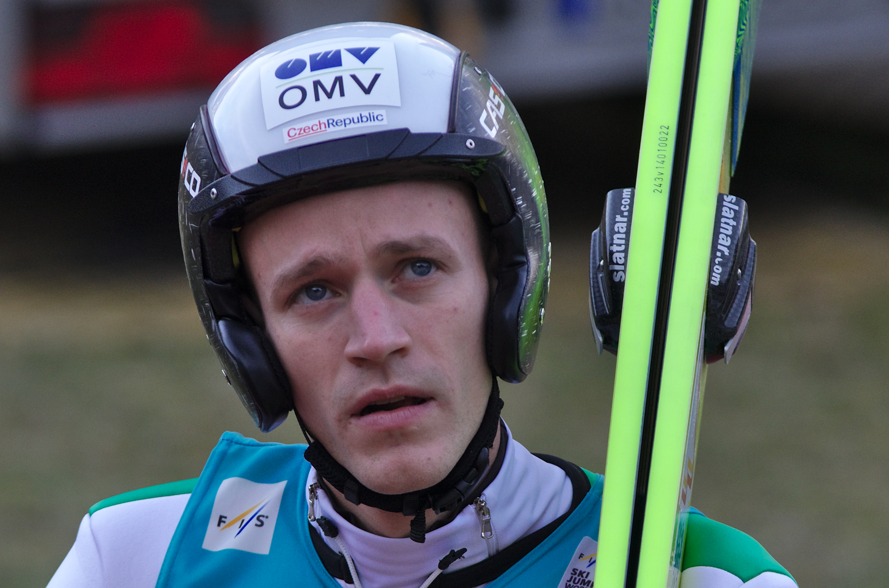 FIS Ski Jumping World Cup 2014 - Engelberg - 20141221 - Roman Koudelka